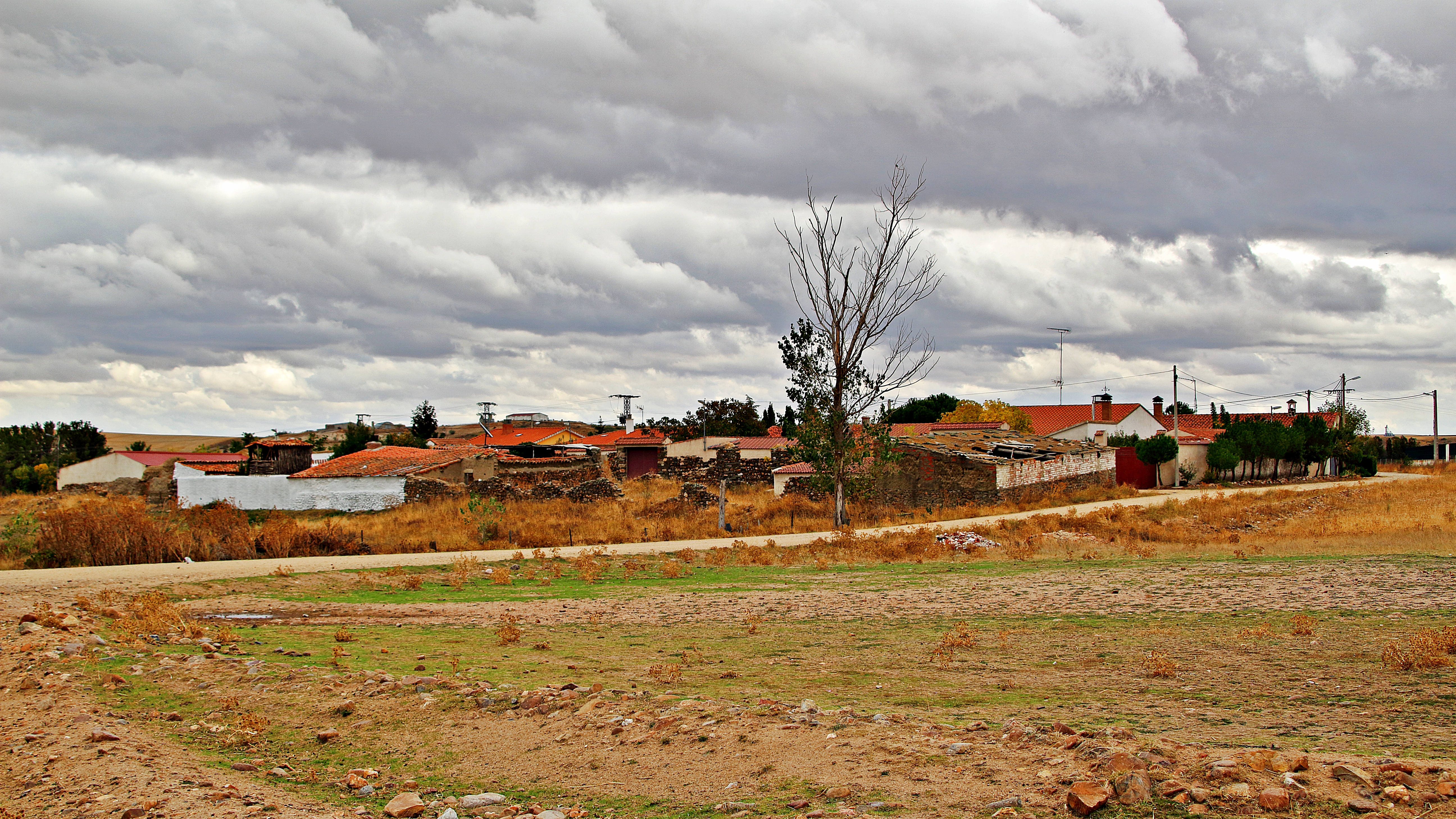 Martín Vicente despoblado del municipio de Éjeme, comarca Tierras de Alba, provincia de Salamanca.